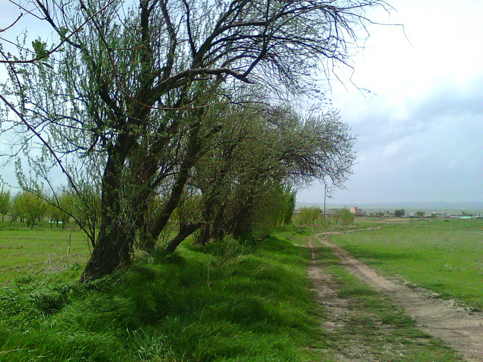 طبیعت کوهستان الوند